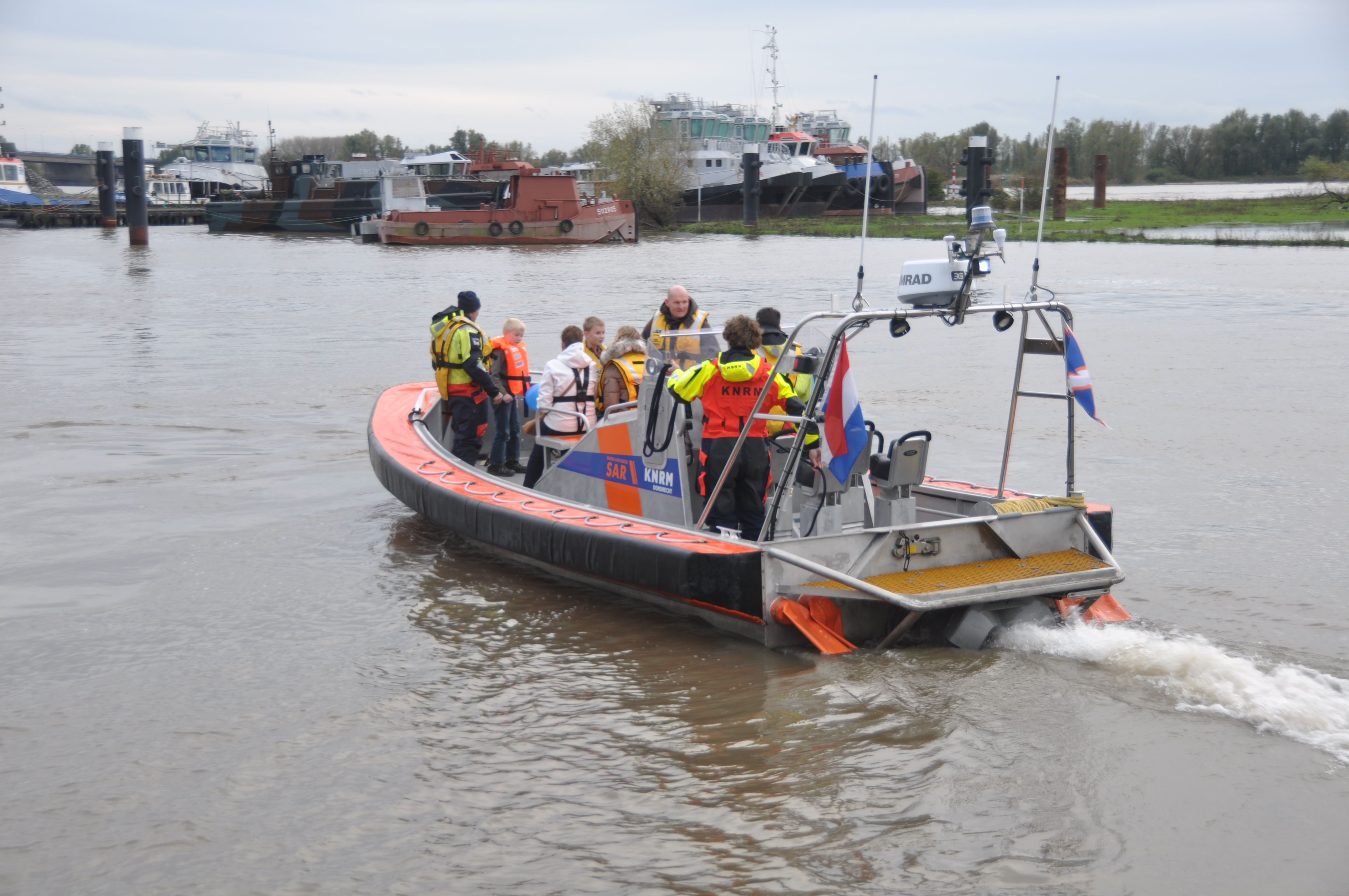 De KBW 1910 van de KNRM op de open dag 2013 bij Damen in Gorinchem.